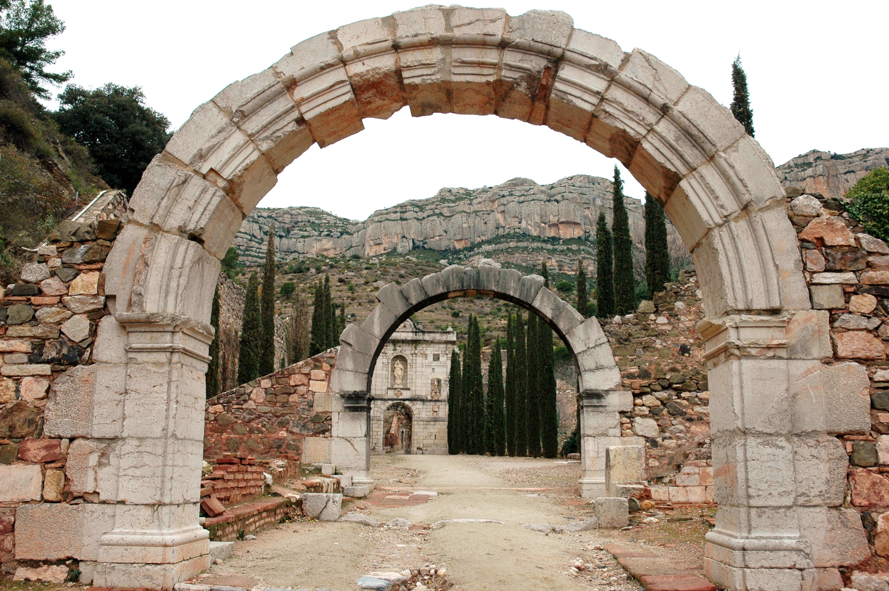 Escaladei - Cartoixa